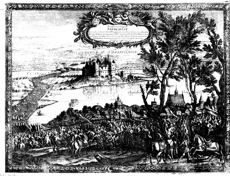 Przeprawa wojsk szwedzkich przez Wisłę pod Zawichostem w 1657 roku. Na pierwszym planie miasto Zawichost, w tle zniszczony zamek.